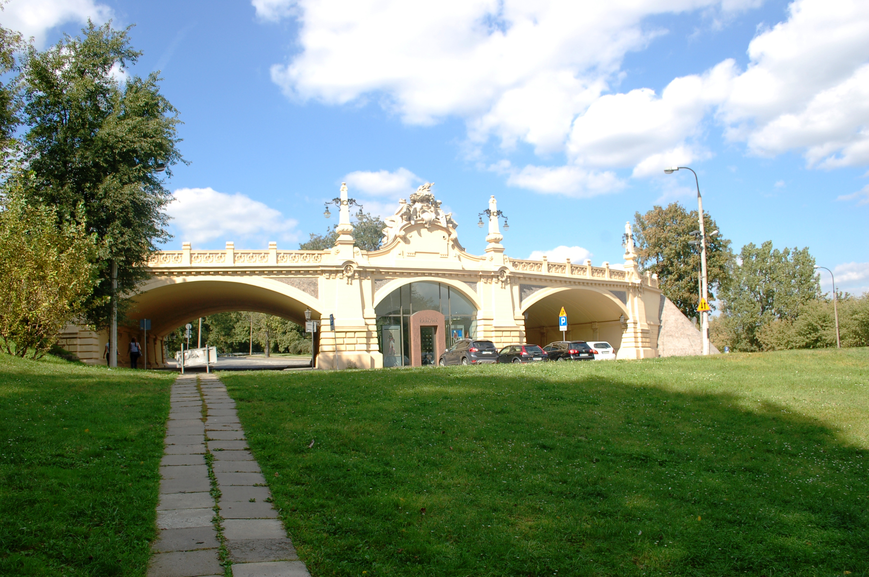 Warschau, Markiewicz-Viadukt in der Karowa-Strasse